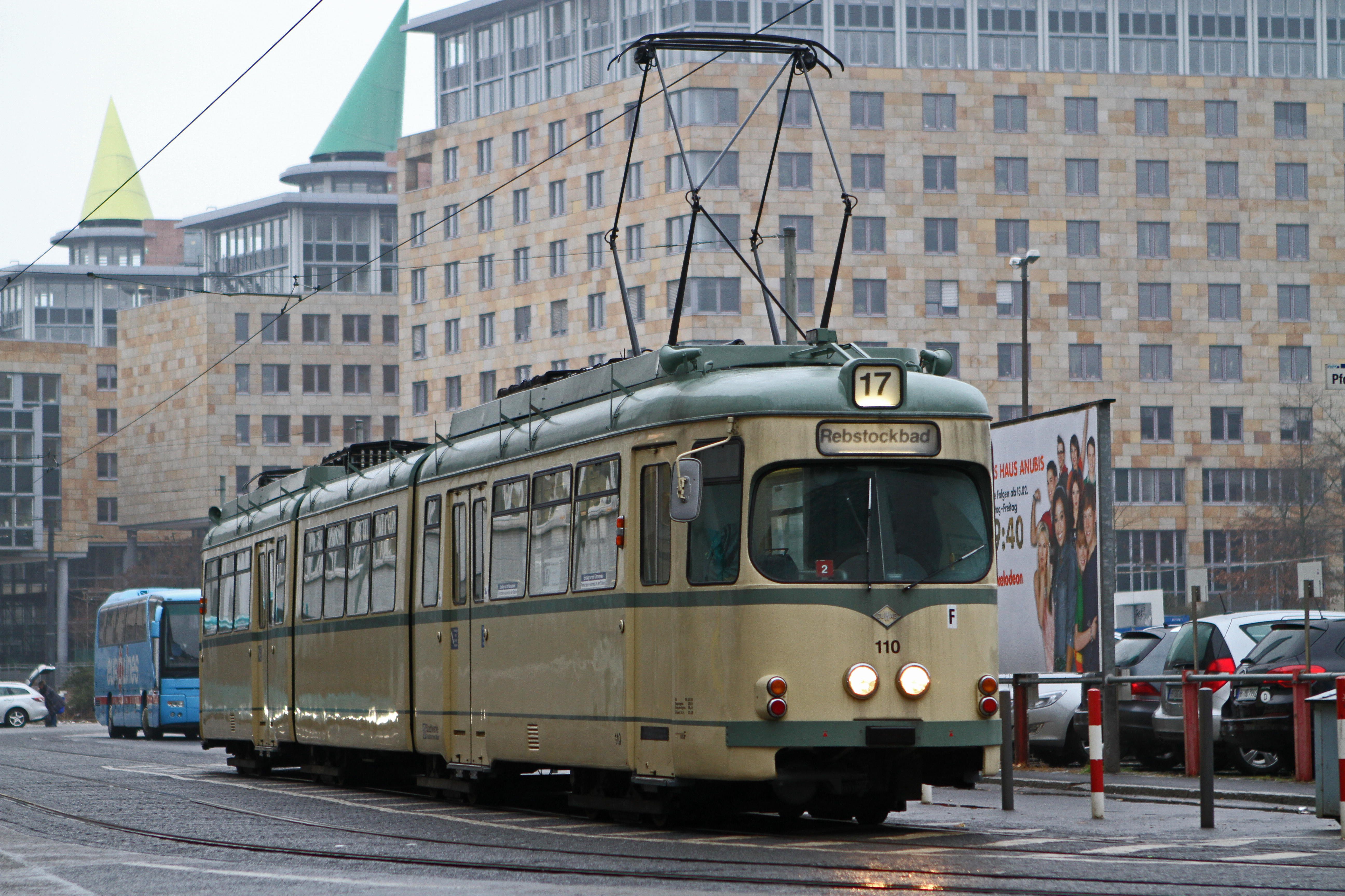 Frankfurtska Tramvaj Typ: 0 od Firmy DÜWAG. Rok vyroby: 1969